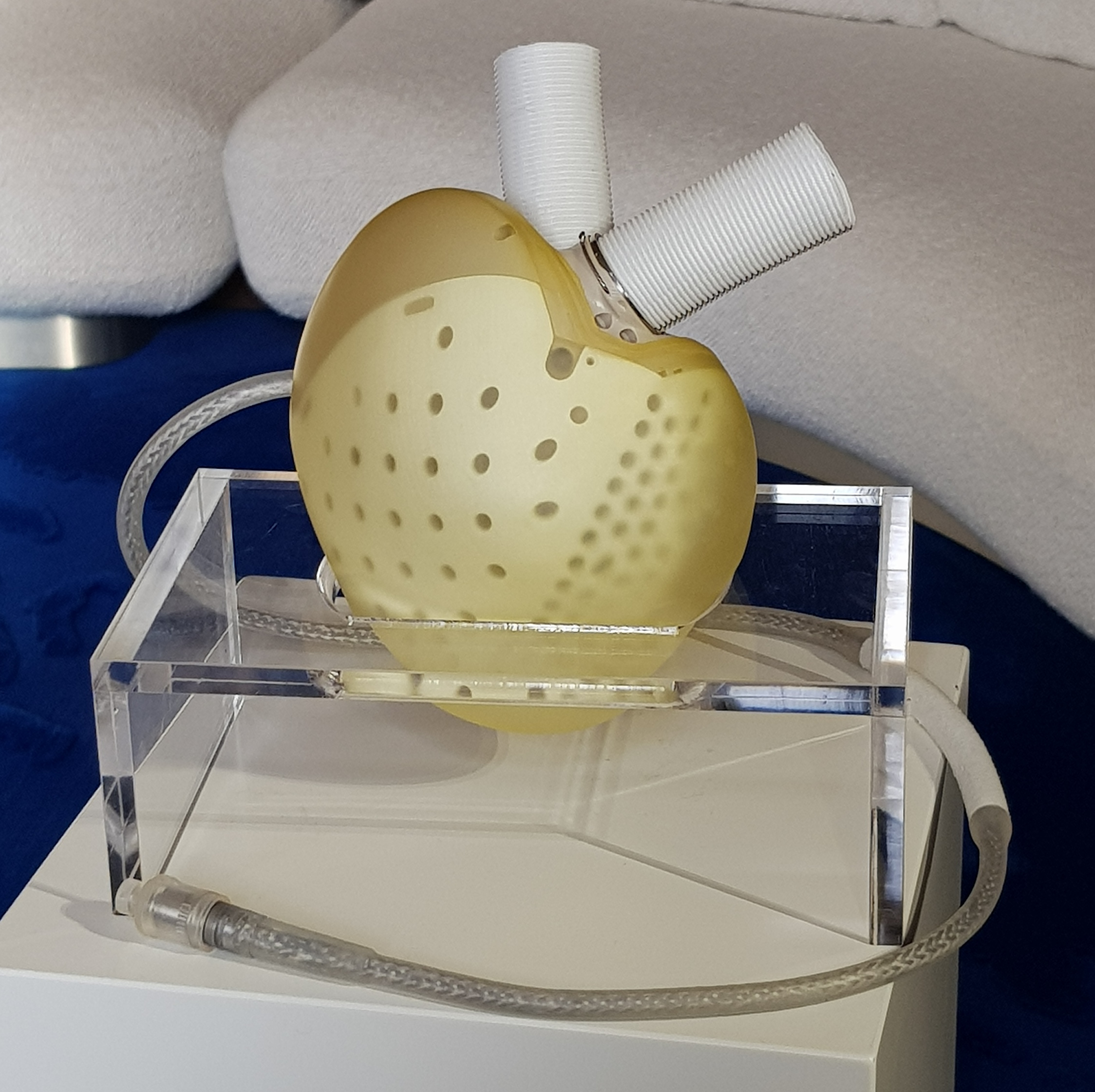 Un coeur artificiel créé par la société Carmat et exposé lors de la Grande Exposition du Fabriqué en France.